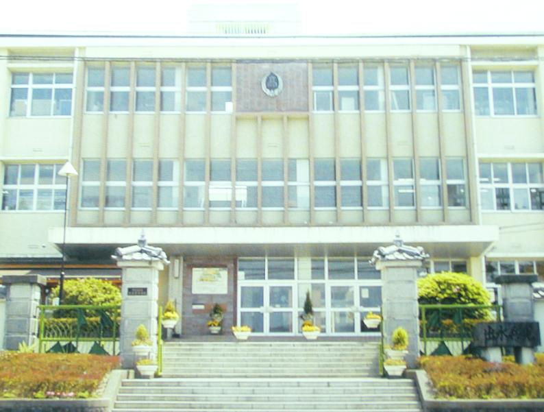 鹿児島県立出水高等学校校舎